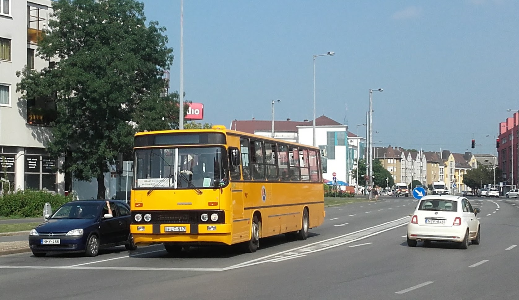 Az ÉMKK HLF-947 rendszámú Ikarus 263.30M típusú busza Nyíregyházán, a 4200-as helyközi járaton.